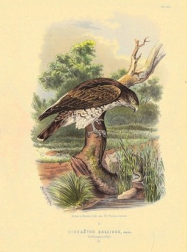 Литография «Орел-змееяд». 28,5х38,5 см